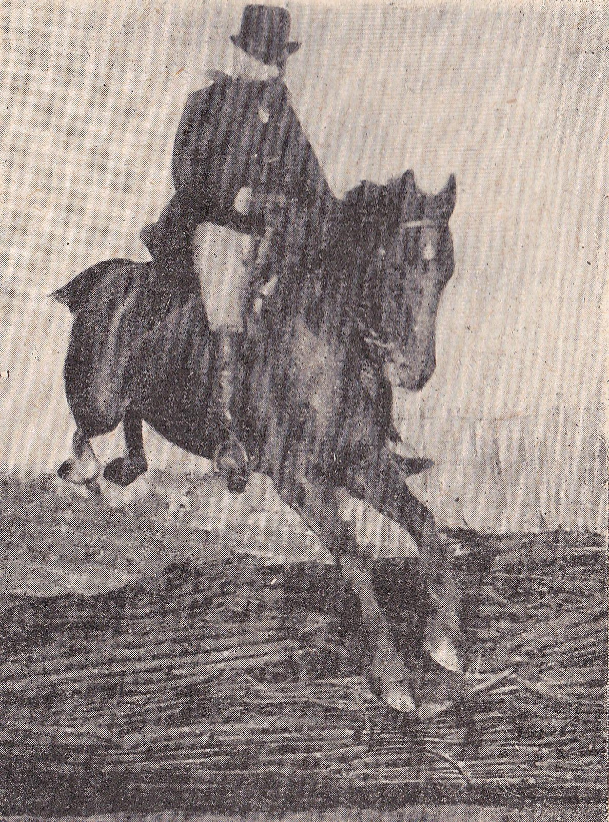 Демонстрация дрессировки, Лебон в седле. Фотография из книги 1895 года.